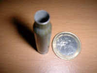 Cartouche provenant d'un tir de FAMAS